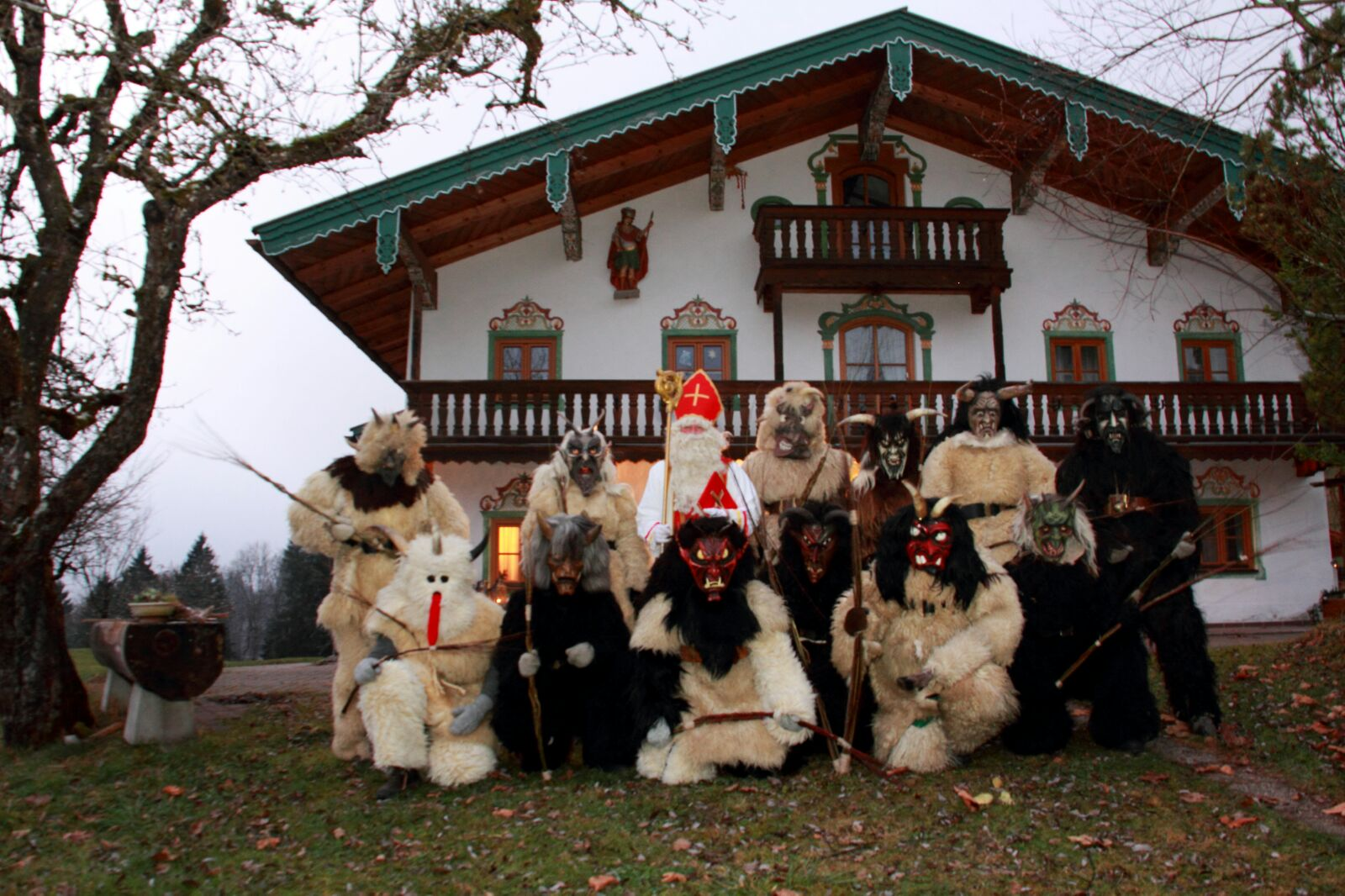 Der heilige Nikolaus mit seinen 12 Krampussen im Weißbachtal Berchtesgadener Land. Einer der wenigen noch traditionellen Bassen nach altem Brauchtum